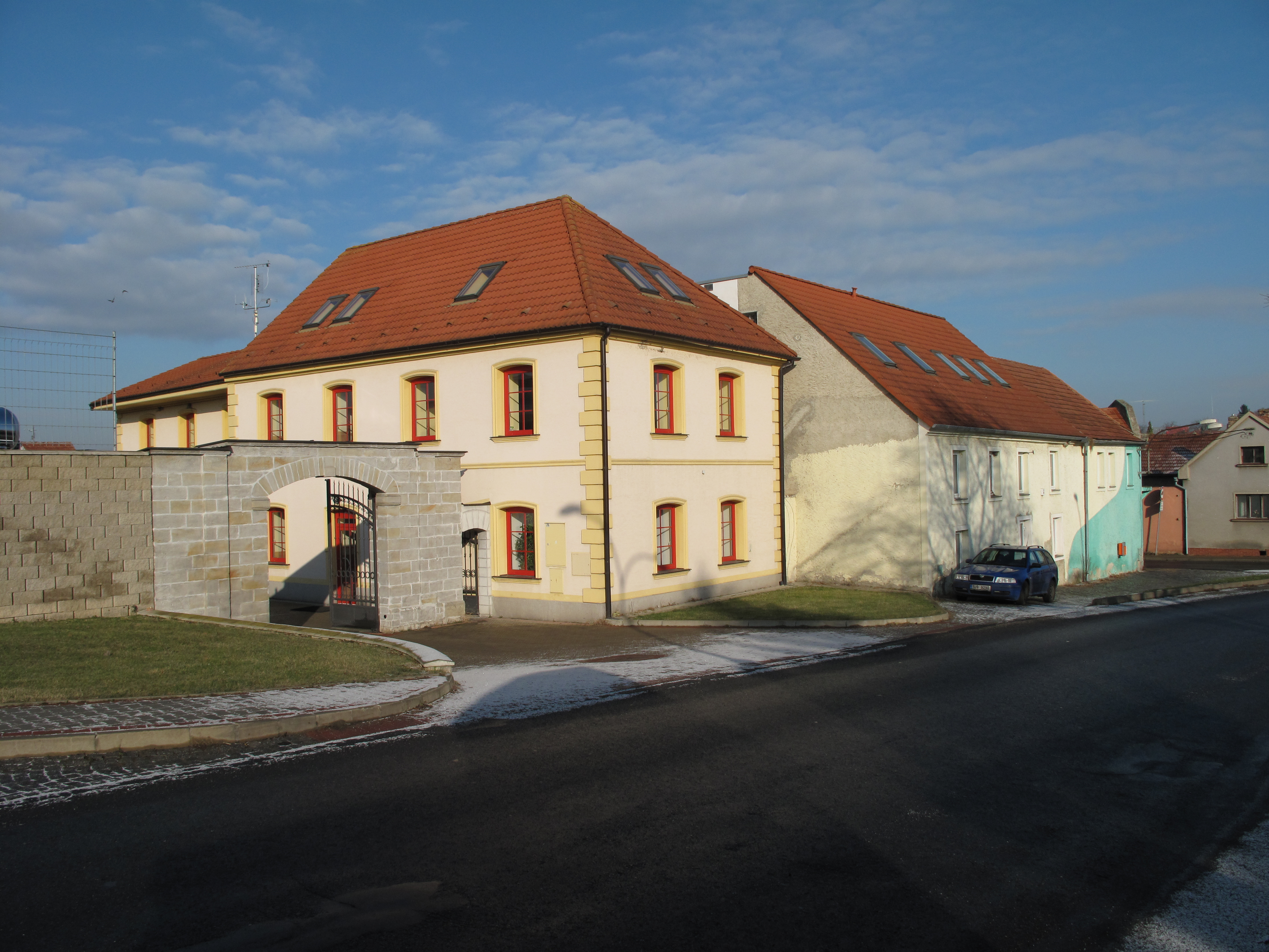 Dům v Podluskách. Okres Litoměřice, Česká republika.